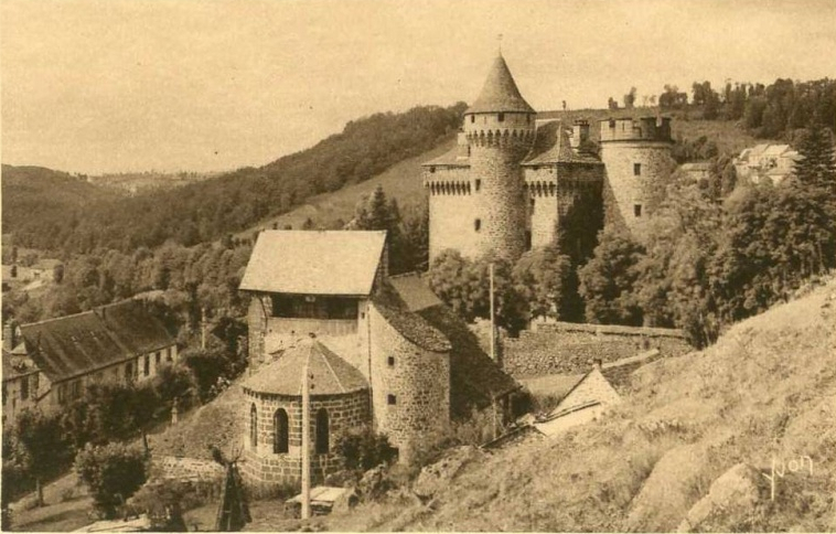 Château des Ternes après restauration. Près de Saint Flour. Date de la carte estimée.